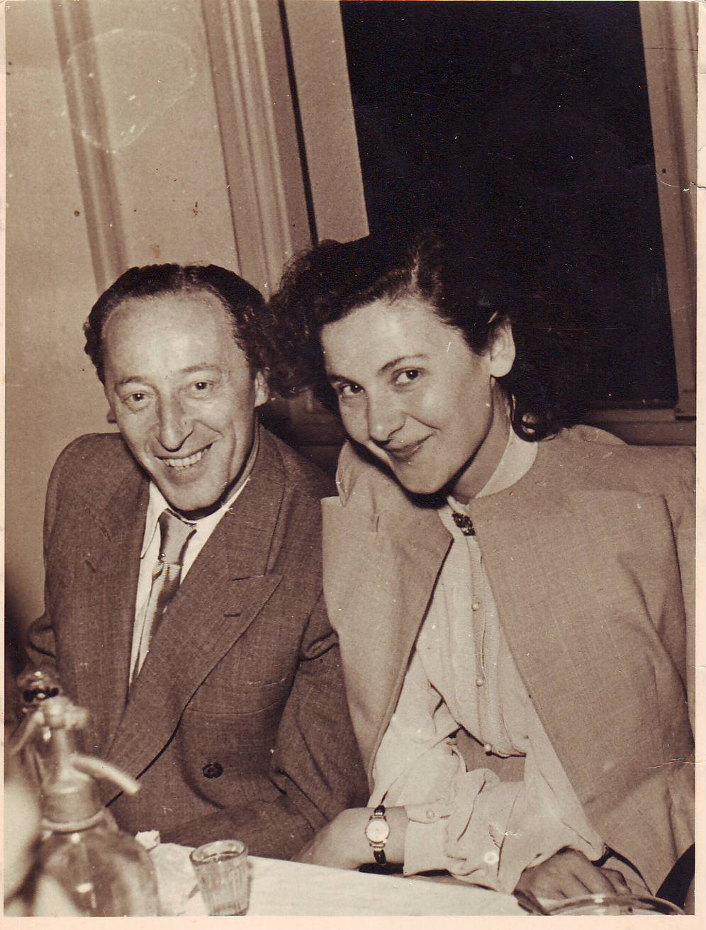 חיה וחיים לזר